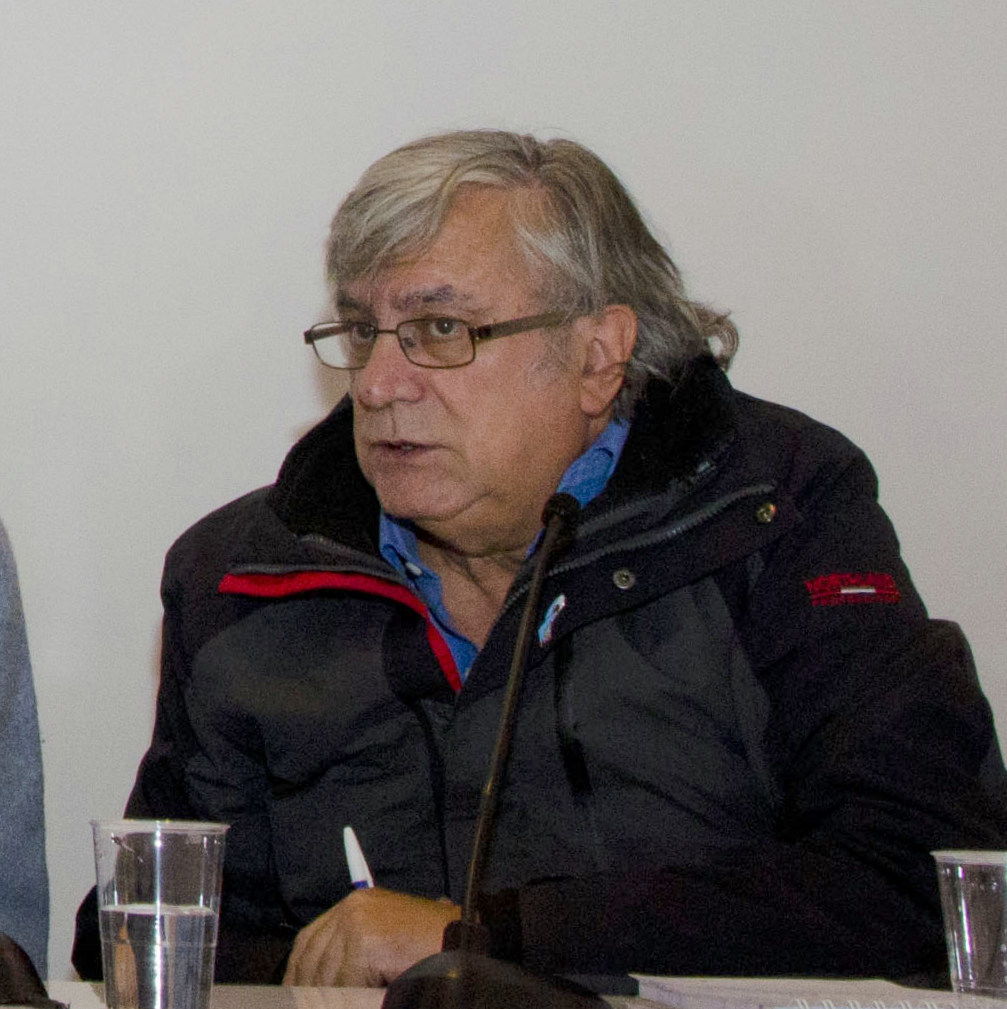 París, 23 de marzo de 2014: Vicente Muleiro modera la mesa "Poesía argentina", en la que participaron las escritoras Luisa Futoransky, Diana Bellesi y Silvia Baron Supervielle, en el Salón del Libro de París (2014). Fotos: Augusto Starita (Secretaría de Cultura de la Presidencia de la Nación)